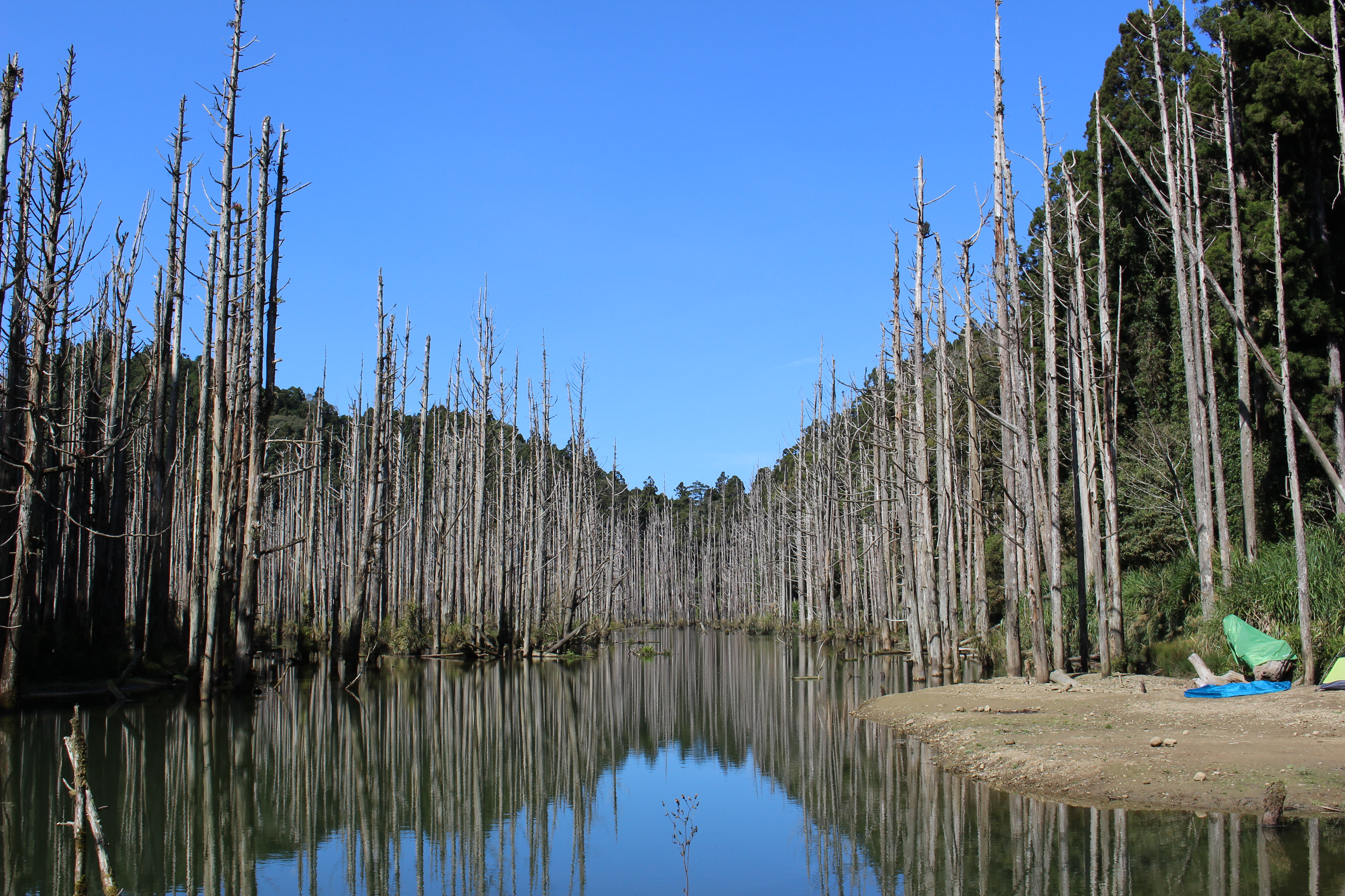 中文（台灣）: 水漾森林景緻